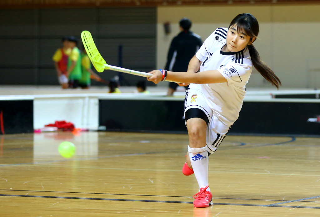 마룻바닥 경기장 플로어볼 여국선수